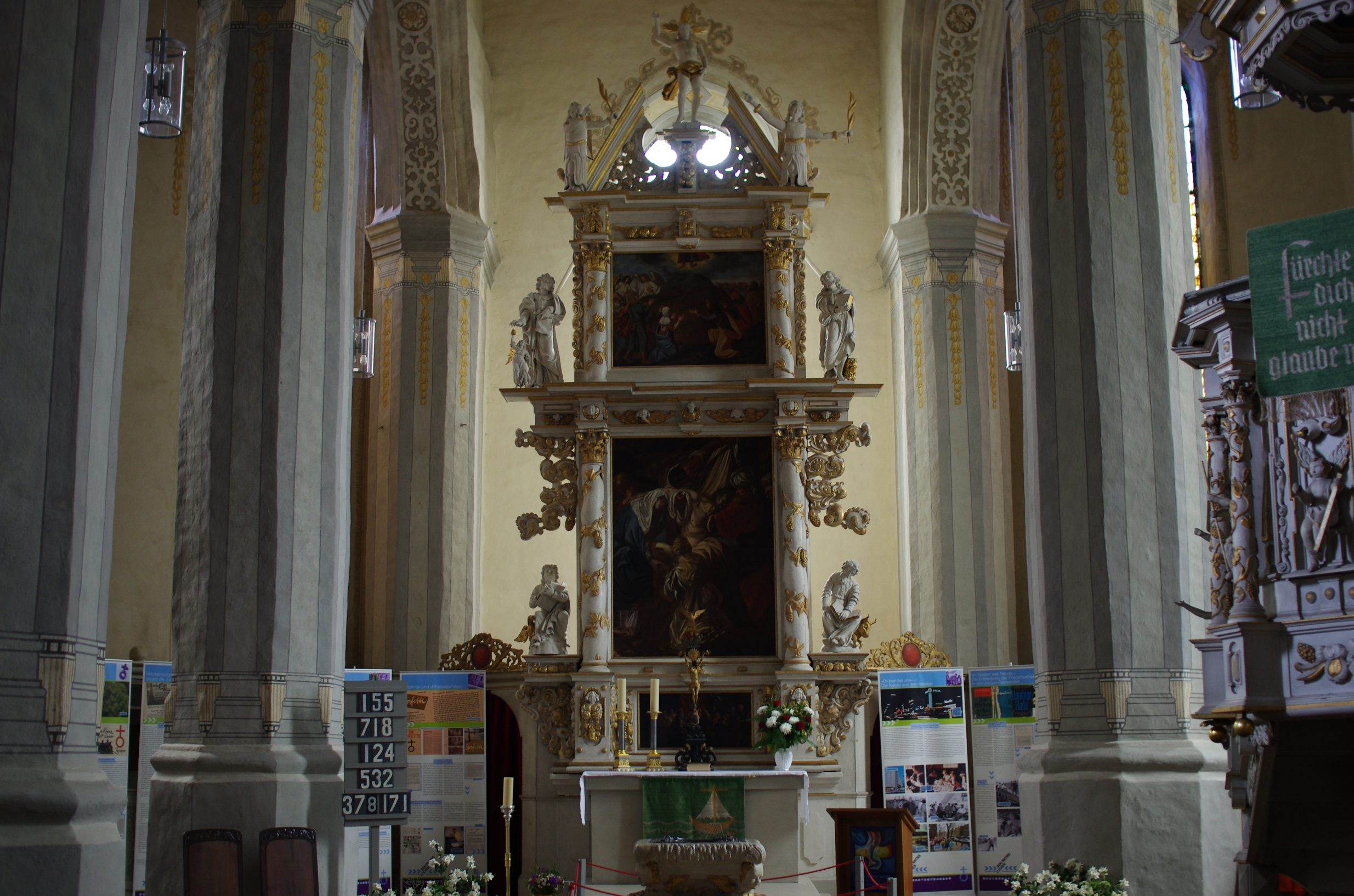 Bad Schmiedeberg in Sachsen-Anhalt. Die Nikolaikirche steht unter Denkmalschutz. Das Bild zeigt de Altar.